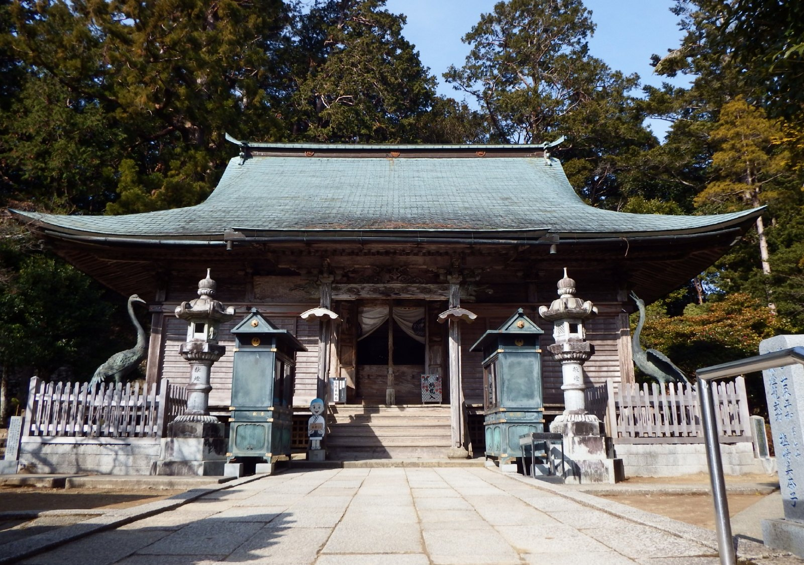 鶴林寺の本堂